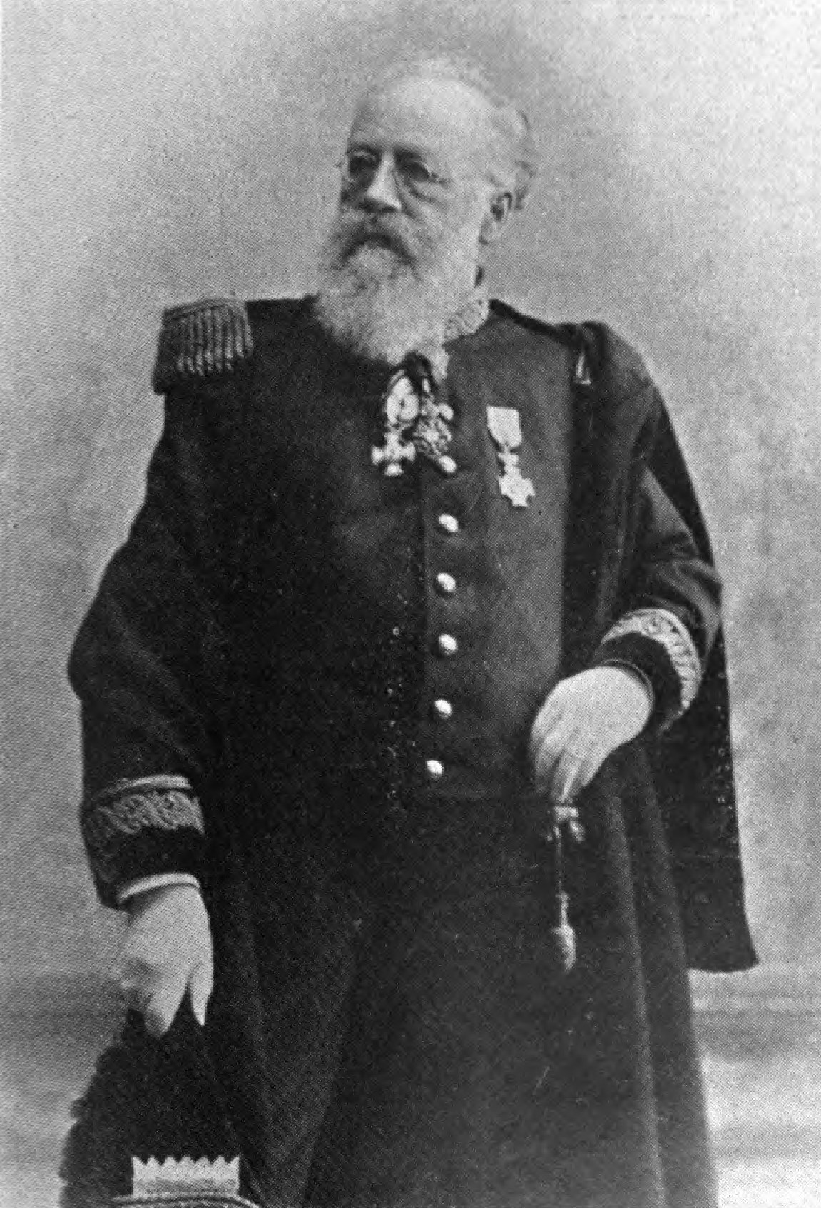 Franz Bonn. In: Ferdinand Bonn, Gesammelte Werke, Band 2. Leipzig: Xenien, 1911